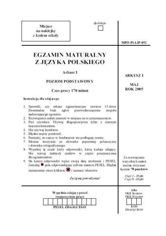 Arkusz Maturalny z języka polskiego, rok 2005